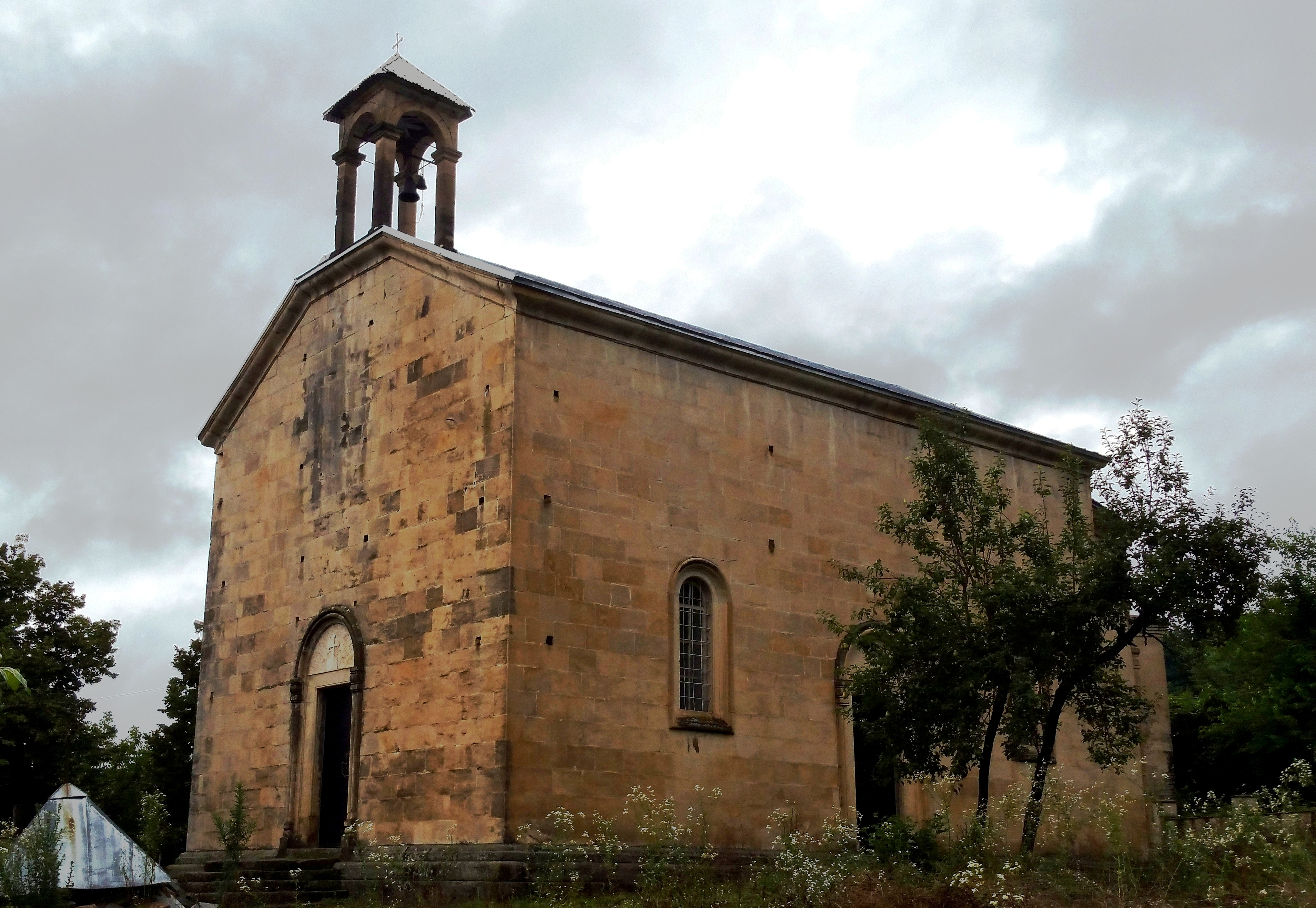 X საუკუნეში აგებული ღვთისმშობლის ტაძრად მიყვანების ჭალის თეთრი ეკლესია, სოფელი წითელხევი, ბაღდათის მუნიციპალიტეტი, იმერეთი